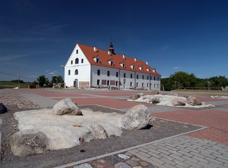 Kražių kolegijos bursa (bendrabutis). Autorius: Vytautas Vorobjovas. 2008.